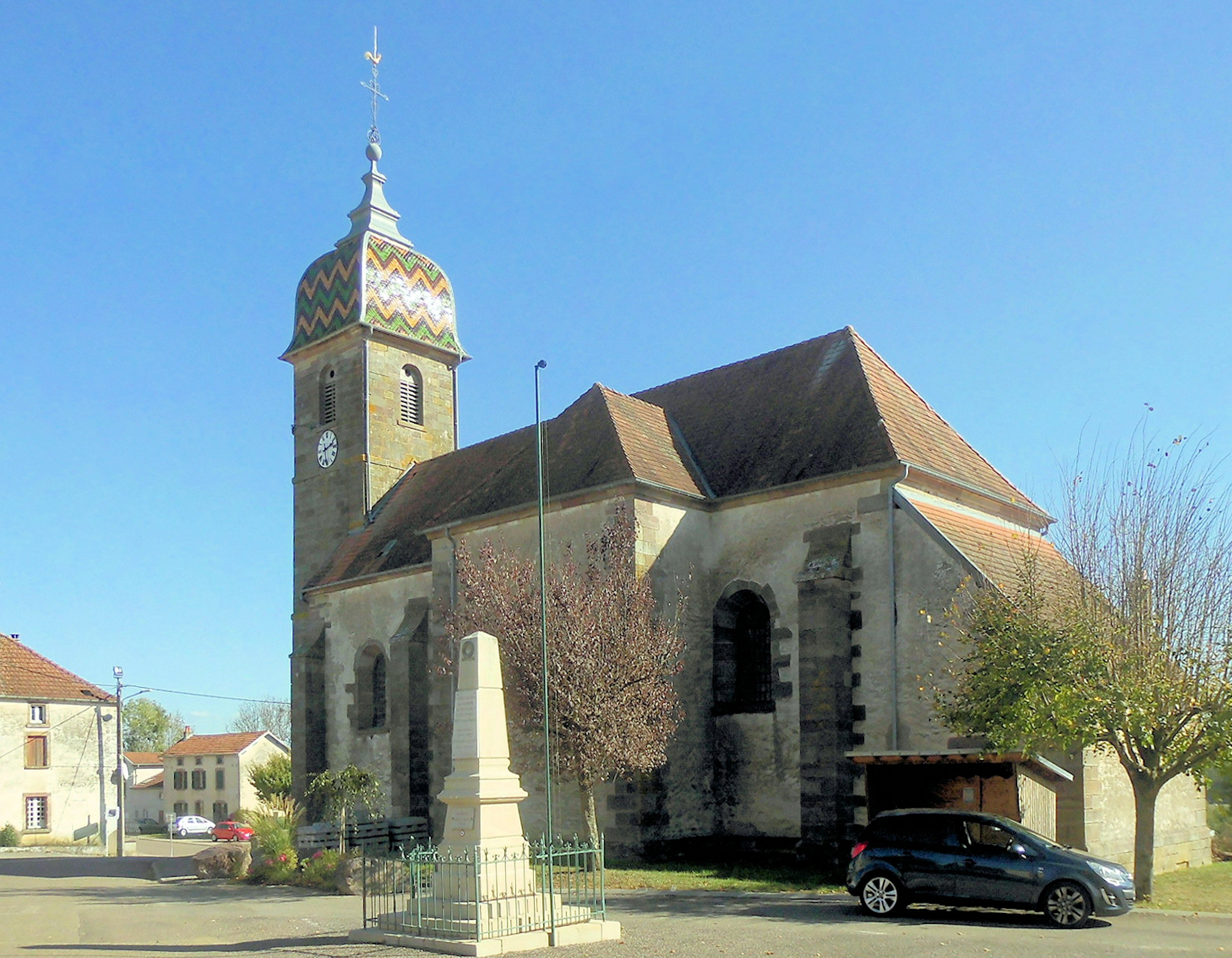 L'église Saint-Étienne de Bassigney